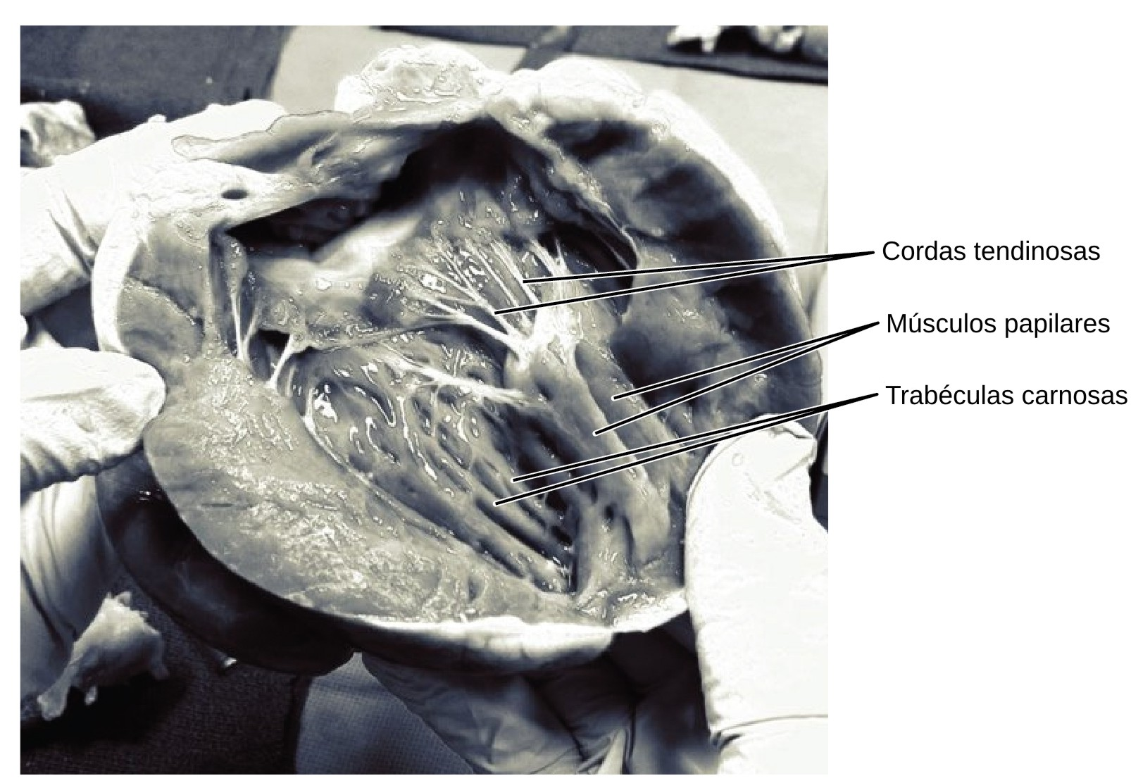 Foto dunha disección do interior do corazón indicando os músculos papilares, cordas tendinosas e trabéculas carnosas